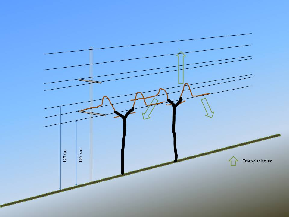 Hochkultur mit Winkelschnitt